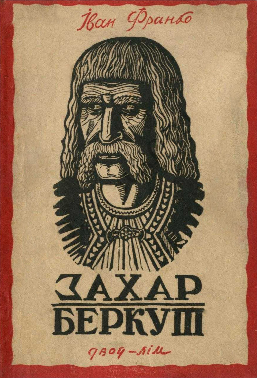 Палітурка видання Івана Франка «Захар Беркут»: Франко І. Захар Беркут: образ громад. життя Карпат. Руси в XIII віці. Вступна стаття: В. Тарнавський. Харків: ЛіМ, 1932. 167 стор. (2-ги вид.)